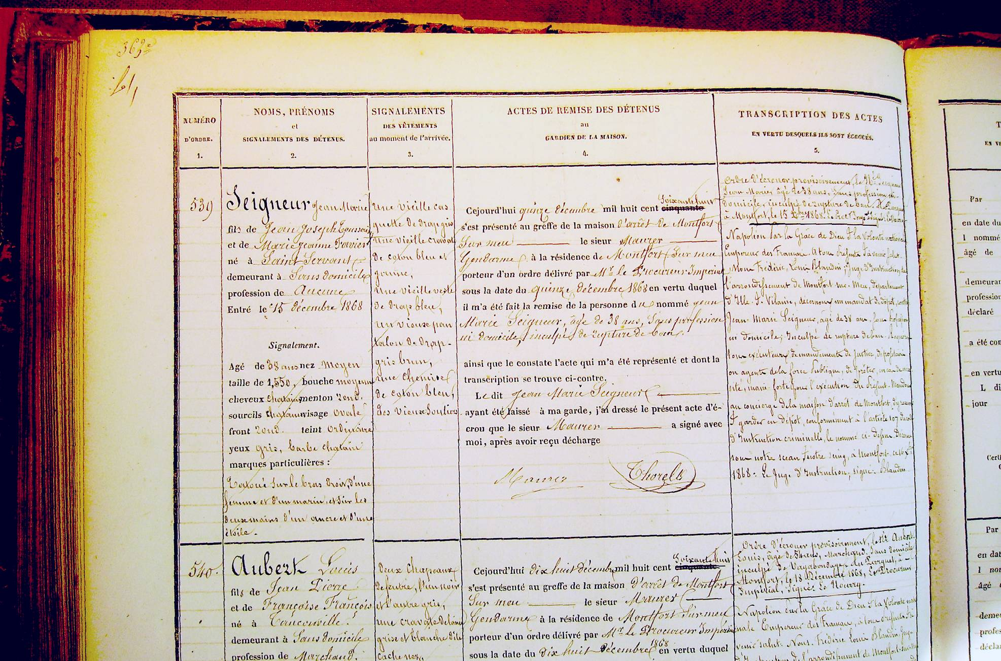 Registre d'écrou des prisons de Montfort-sur-Meu de 1859 à 1869, conservé aux Archives départementales d'Ille-et-Vilaine, sous-série 3 Y. Chaque page comporte trois cases comme celle-ci, la page en regard étant principalement vouée aux conditions de sortie du détenu, non-lieu, peine accomplie, transfert par exemple pour jugement en Assises. Ce registre a été abîmé en 1944 : voir File:Registre Ille-et-Vilaine bombardements 1944.jpg.